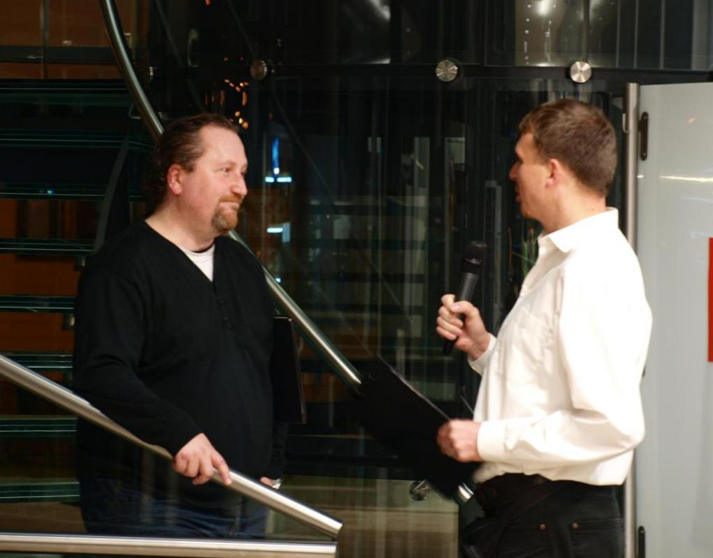 Trutnov Uffo